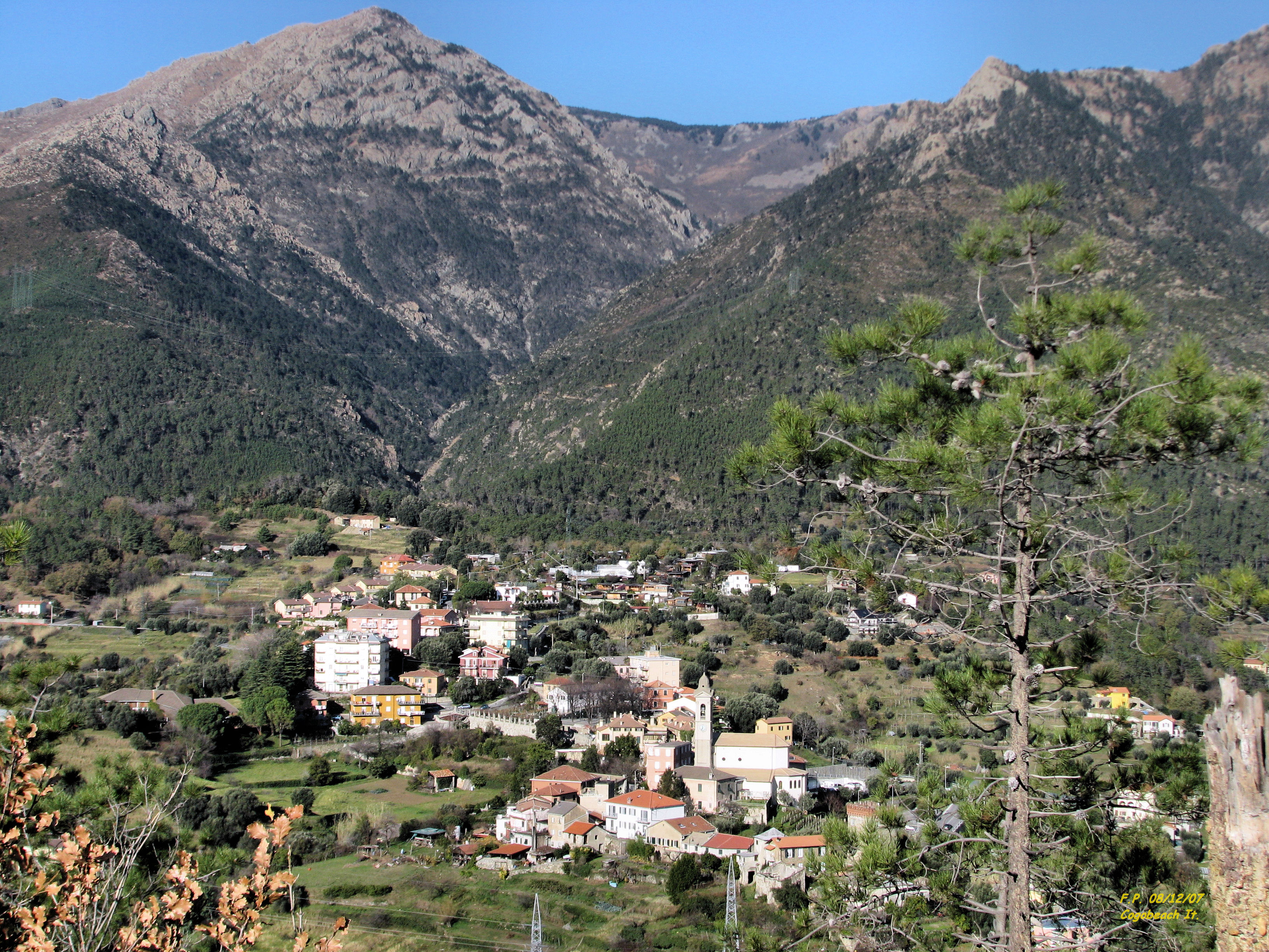 Autore Patrone F. Fonte Imm.Propia Descriz. Lerca & Monte Rama Licenza GDFL CC-BY-SA-2.5 Note Ripresa da 150mt S.L.M.